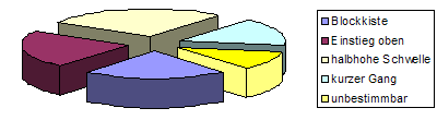 Urdolmen